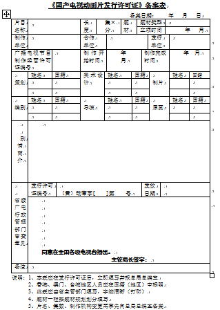 中文（中国大陆）: 广电总局审批动画许可证